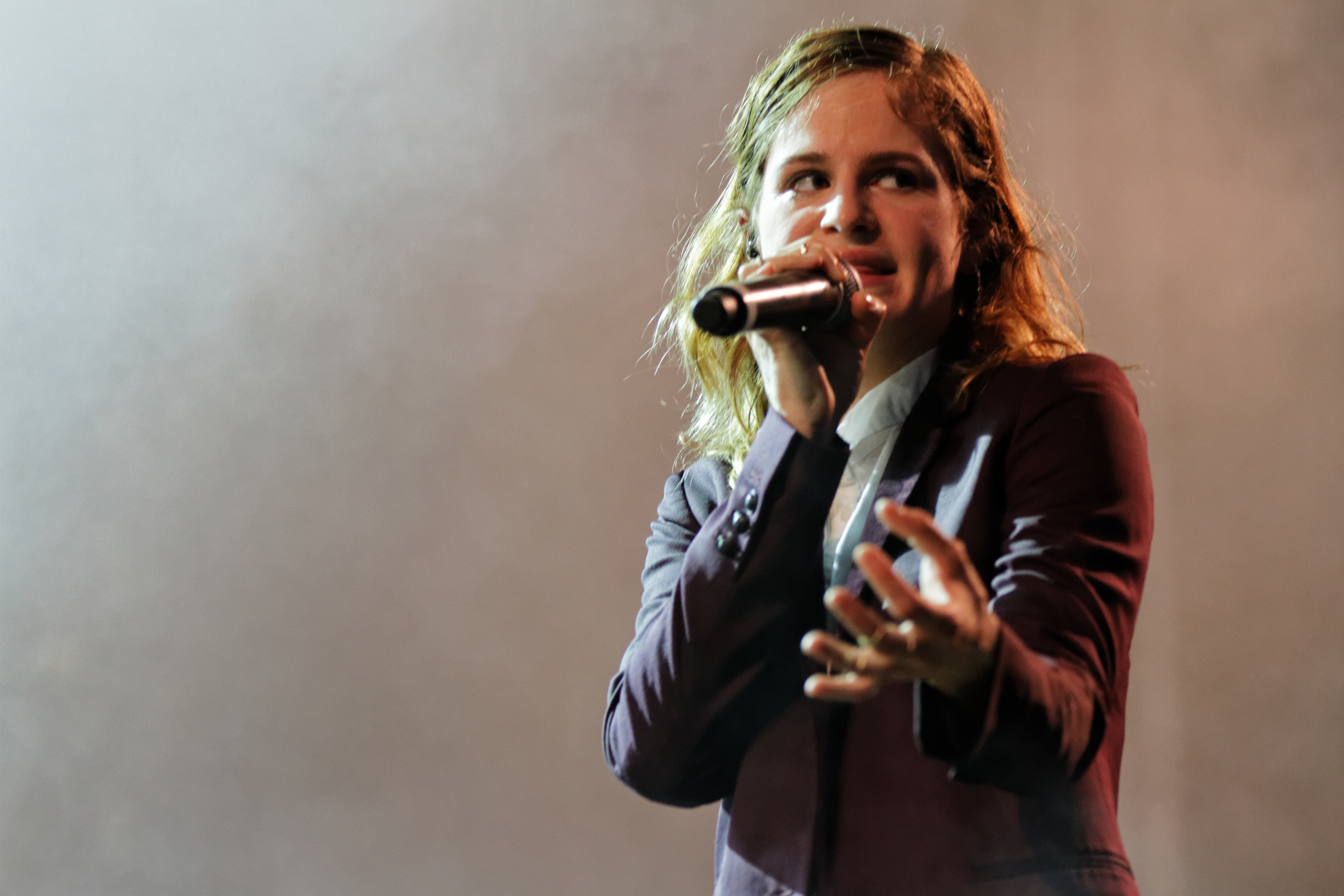 Christine and the Queens en concert sur la scène Grall lors du festival des Vieilles Charrues 2014.